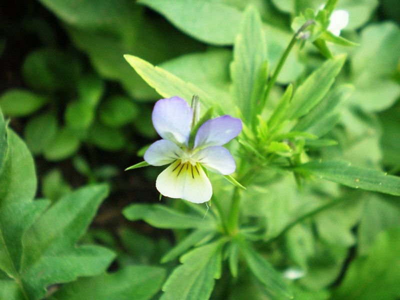 Viola arvensis